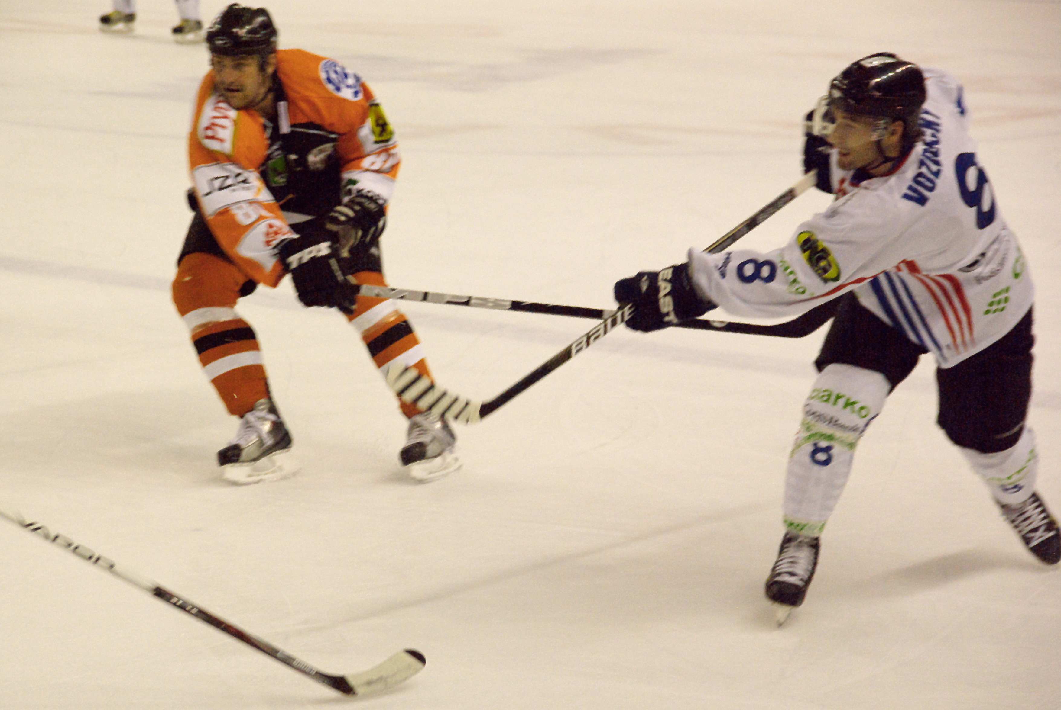 Milan Furo (JKH Jastrzębie) / Martin Vozdecký (KH Sanok) w meczu w Sanoku (19.09.2010)